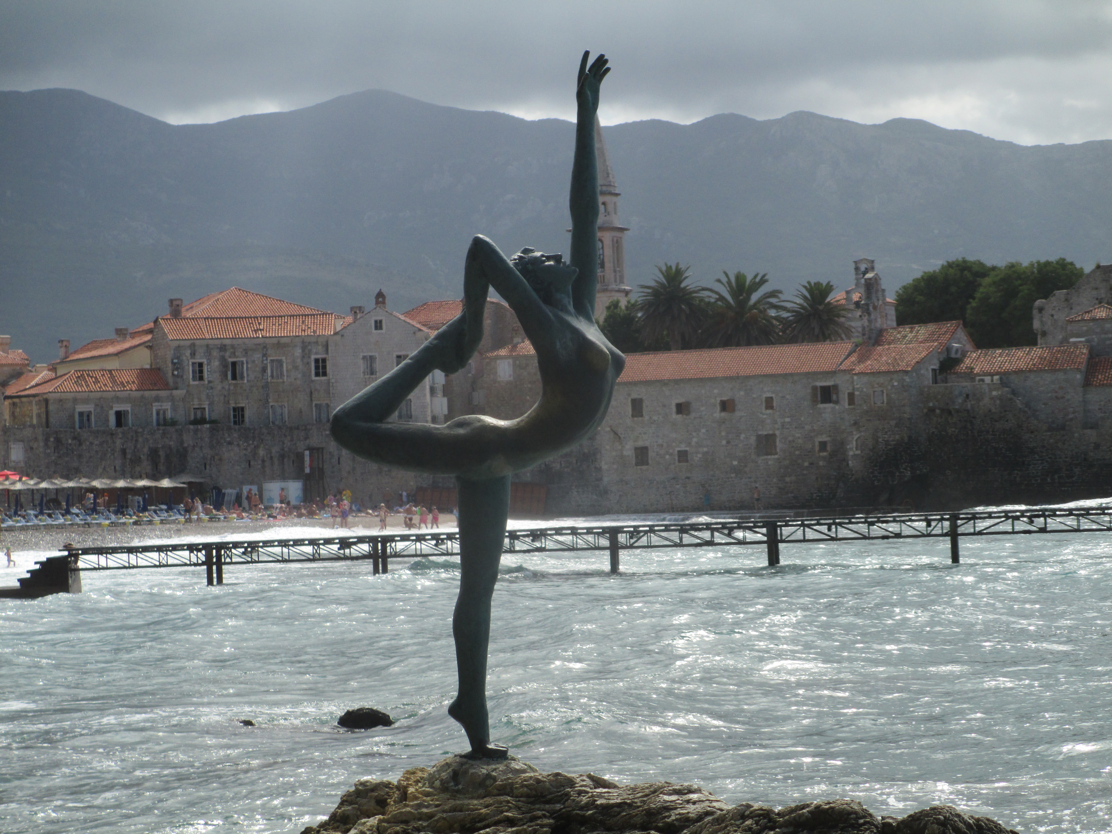 פסל הרקדנית בחוף בודבה